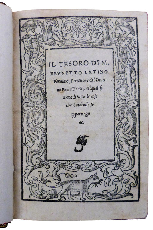 Terza edizione. La prima, in formato in-folio fu impressa a Treviso nel 1474, mentre la seconda a Venezia dai fratelli da Sabbio nel 1528. La presente, come scrive il Brunet: L’édition de Venise, in- 8° est rare”. Edizione in fronte alla quale vi è una dedicatoria senza data di Nicolò Garanta al Magnifico M. Piero Morosini. La differenza più notabile che si riscontra rispetto alla prima edizione, consiste nell’essere divisa in nove libri, al sesto de’ quali è contenuto il volgarizzamento della “Ethica di Aristotile”.